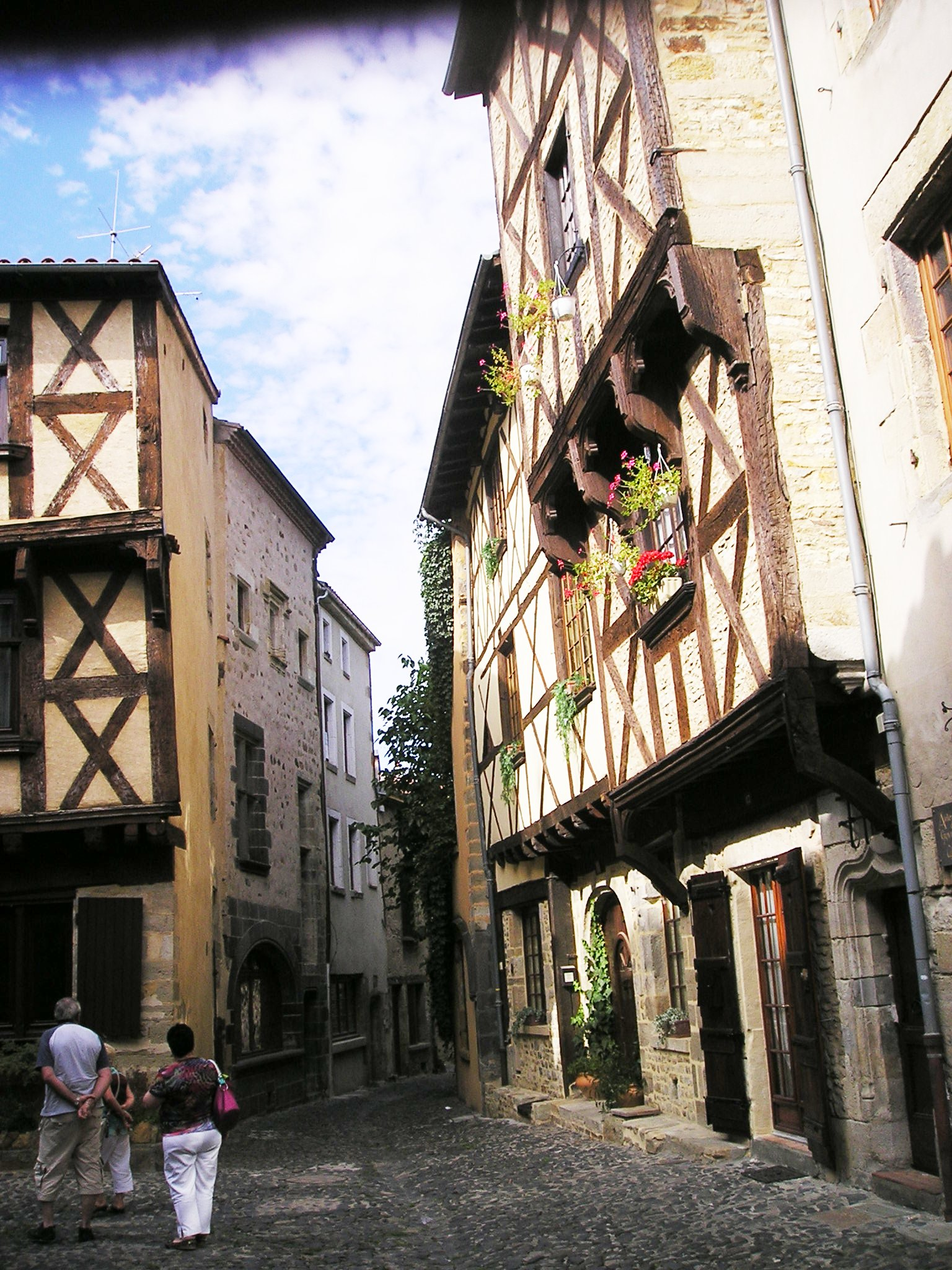 Billom,_Fachwerkbauten